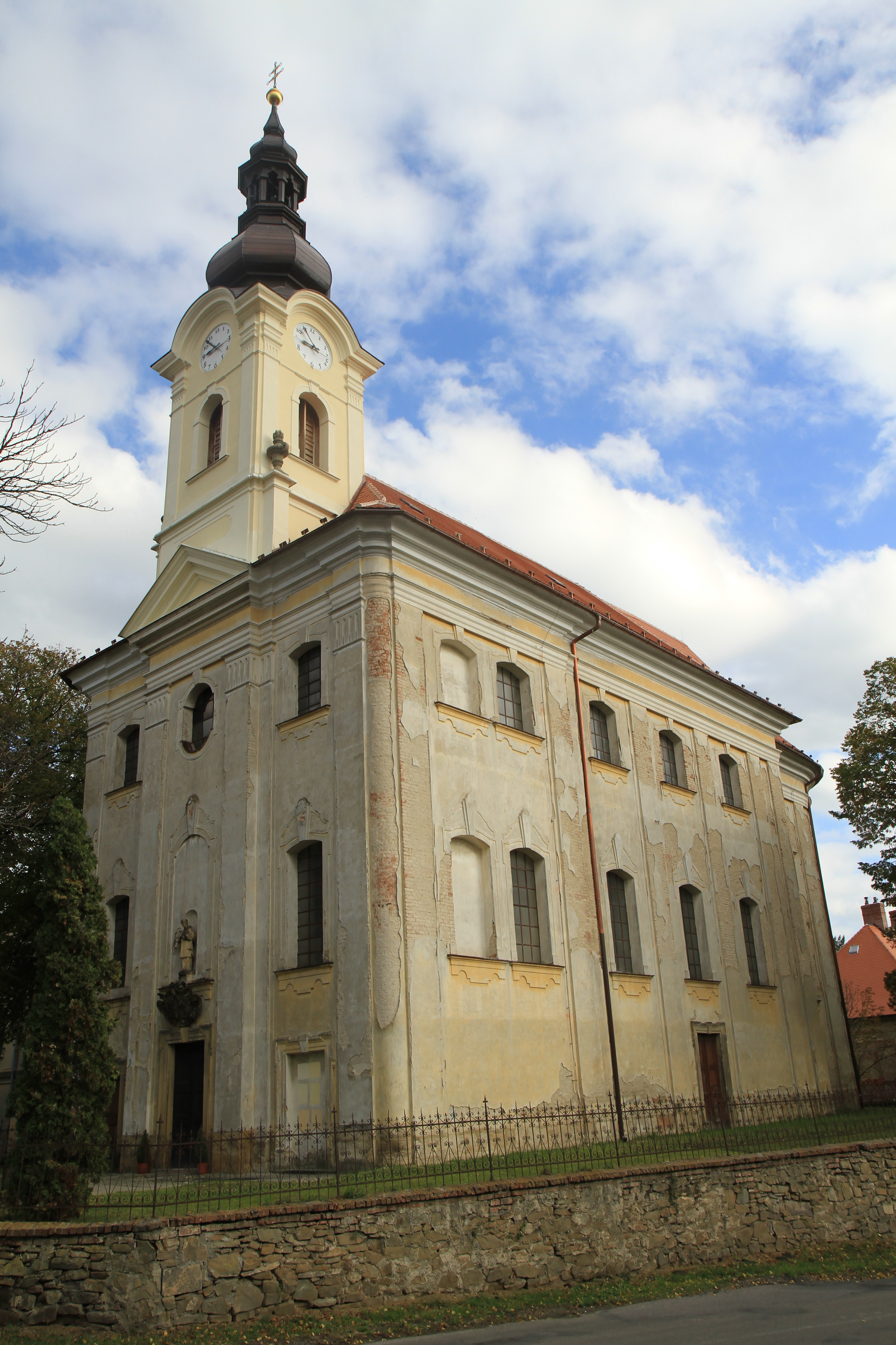 Kostel svatého Vavřince, Výšovice, okres Prostějov.